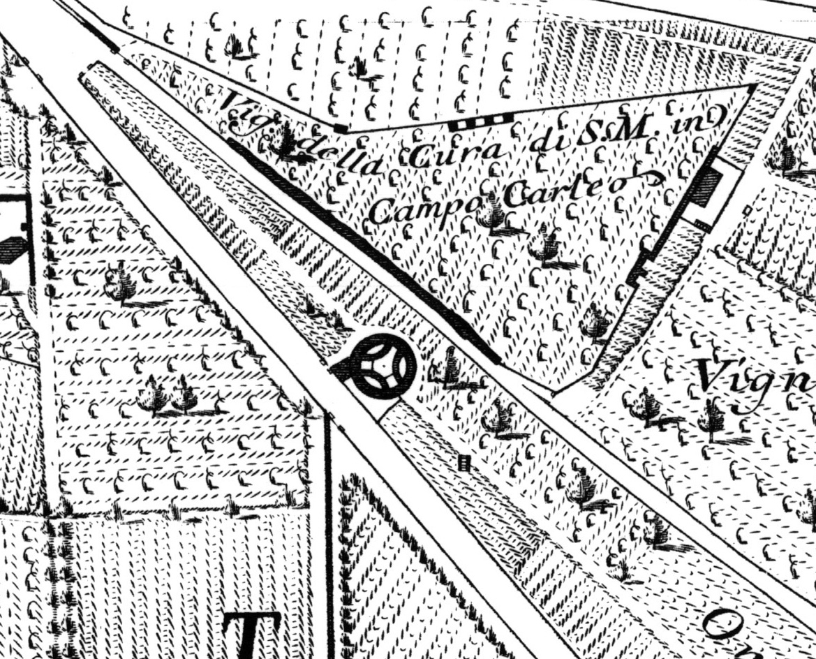 La Casa Tonda nella Pianta del Nolli (1748)